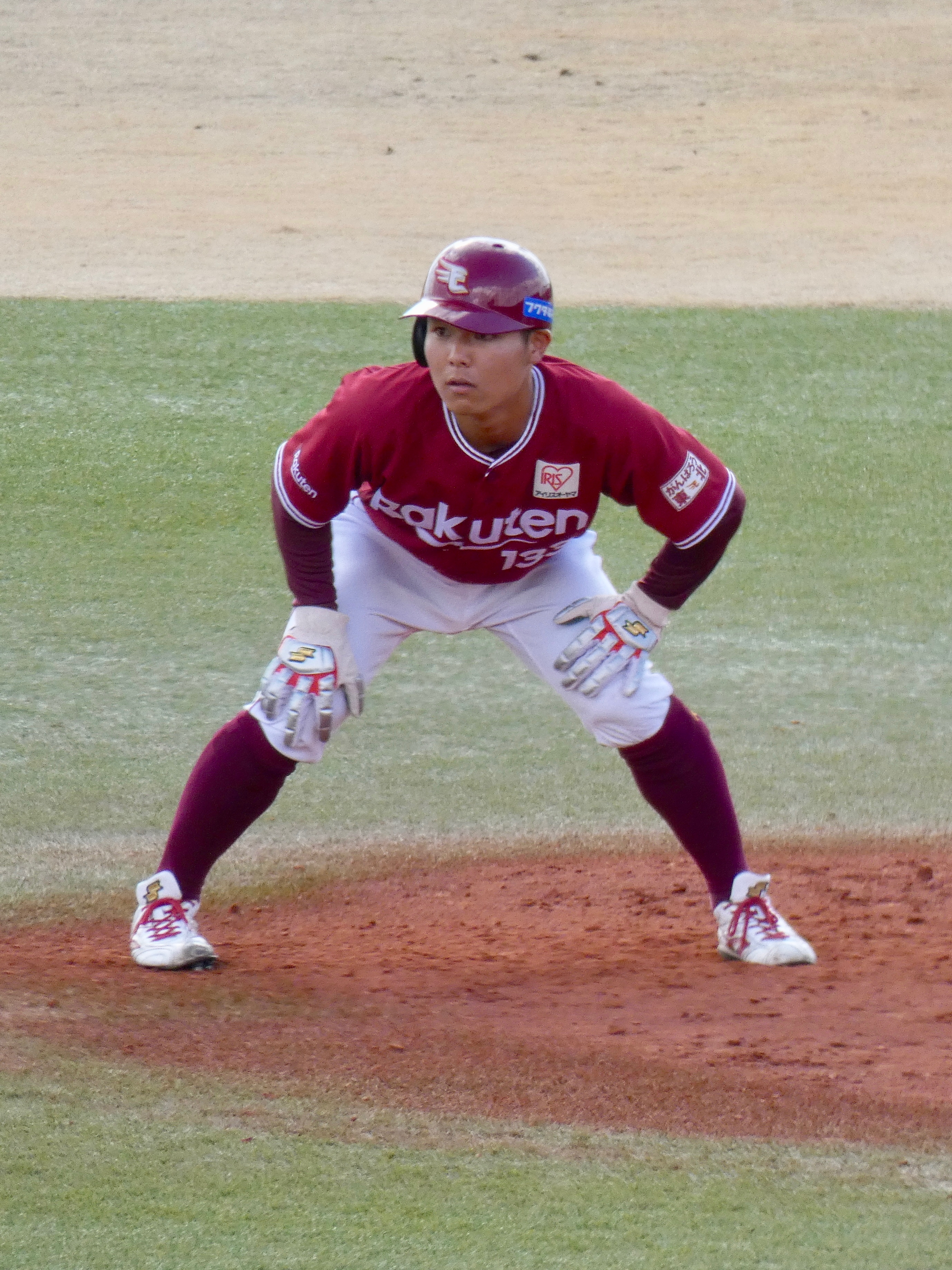 東北楽天ゴールデンイーグルスの選手「松本京志郎」。ヤクルト戸田球場にて。